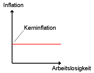 keynesianische Phillips-Kurve